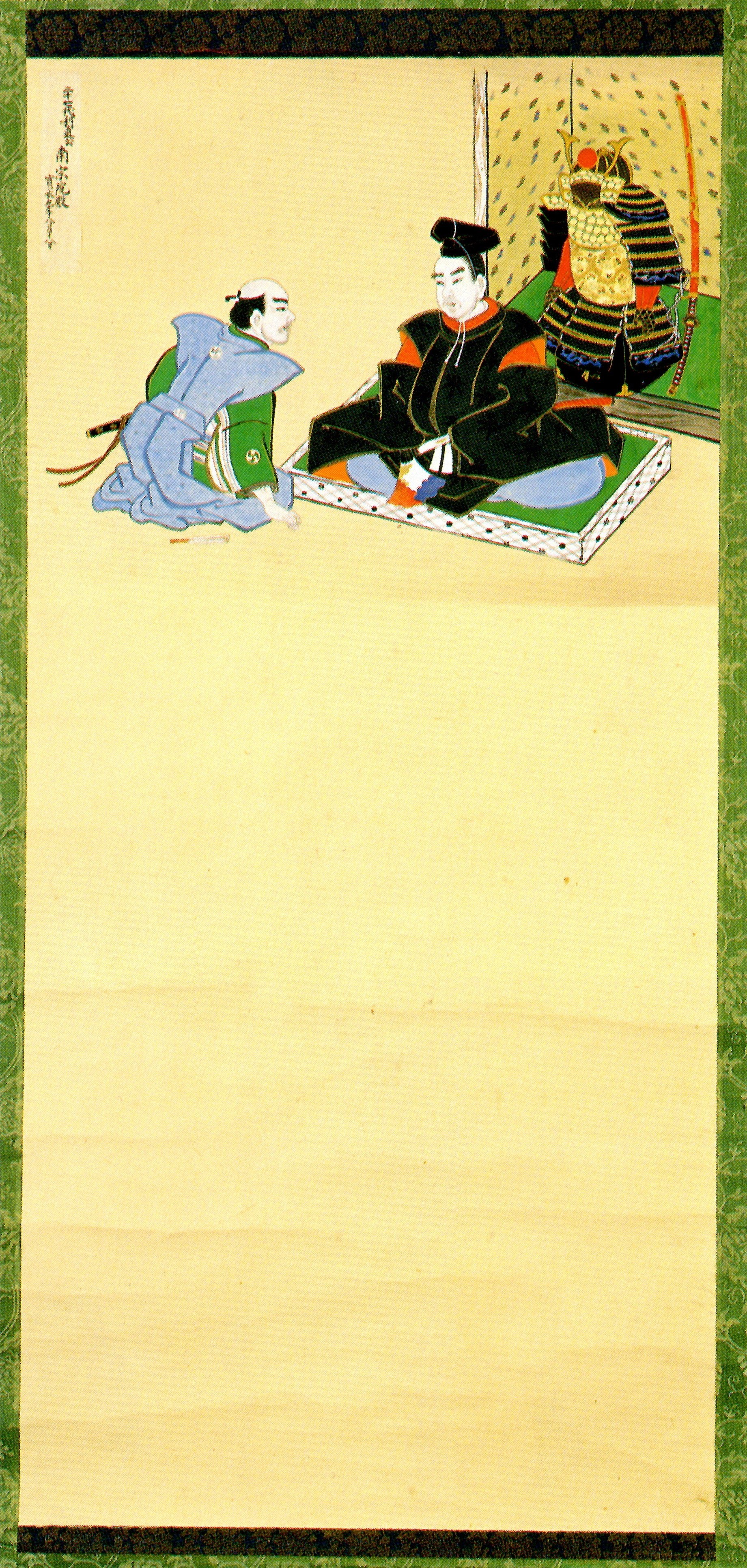 南部利直(右)と北信愛(左)の対面図。